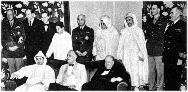 Janvier 1943. Rencontre entre Roosevelt et Mohammed V en marge de la conférence d'Anfa.